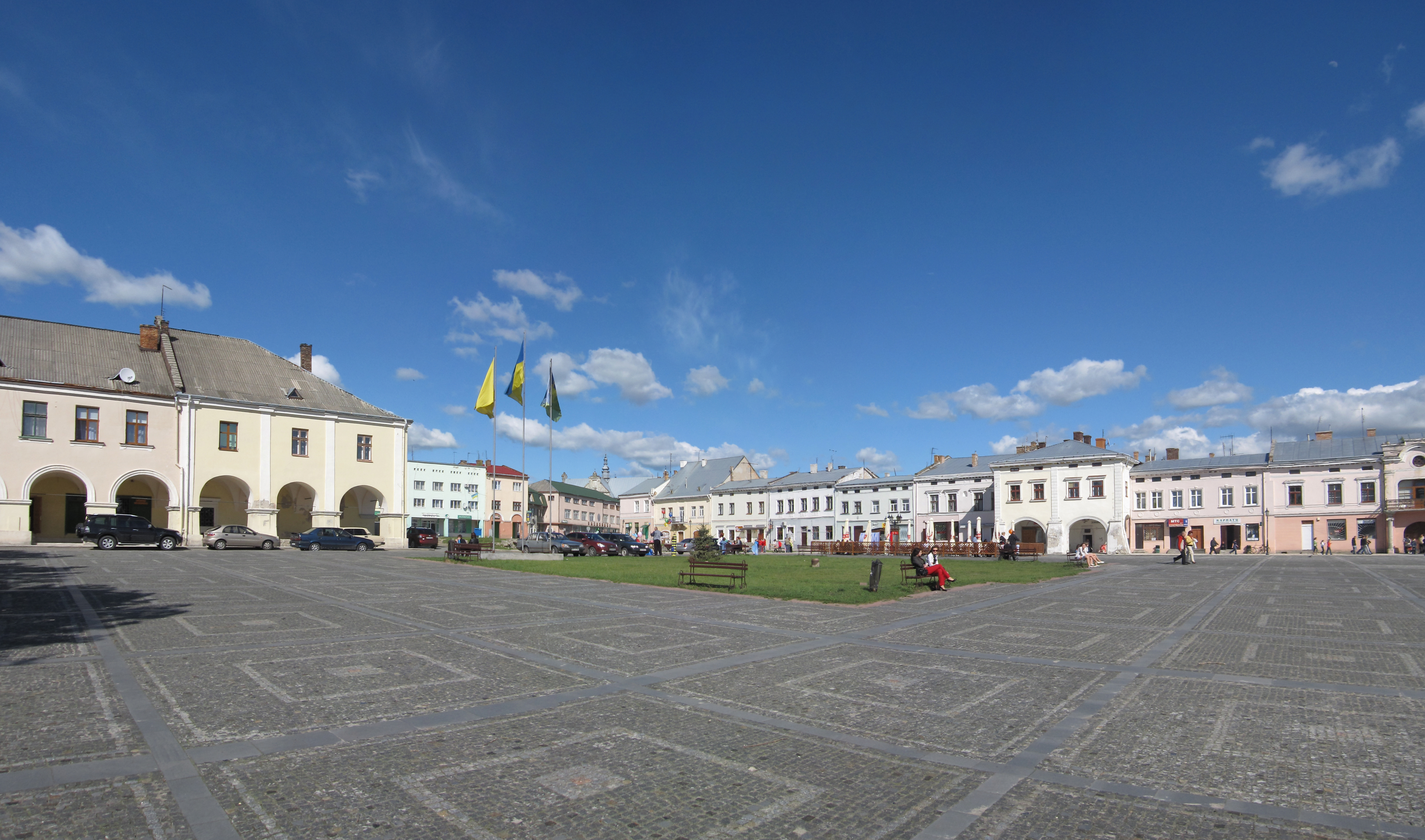 Zhovkva